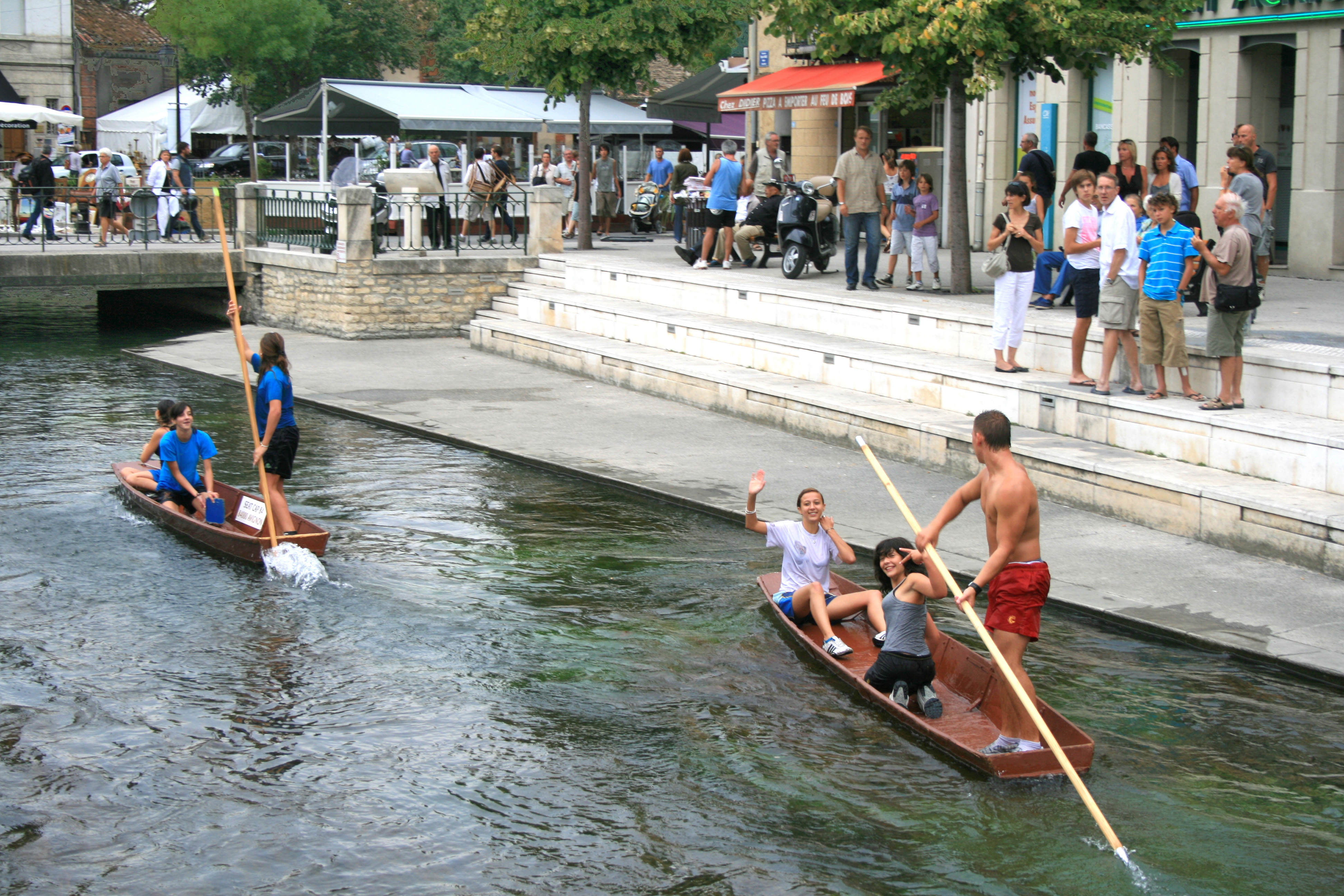 L'Isle-sur-la-Sorgue. Nego-chin : barque à fond plat